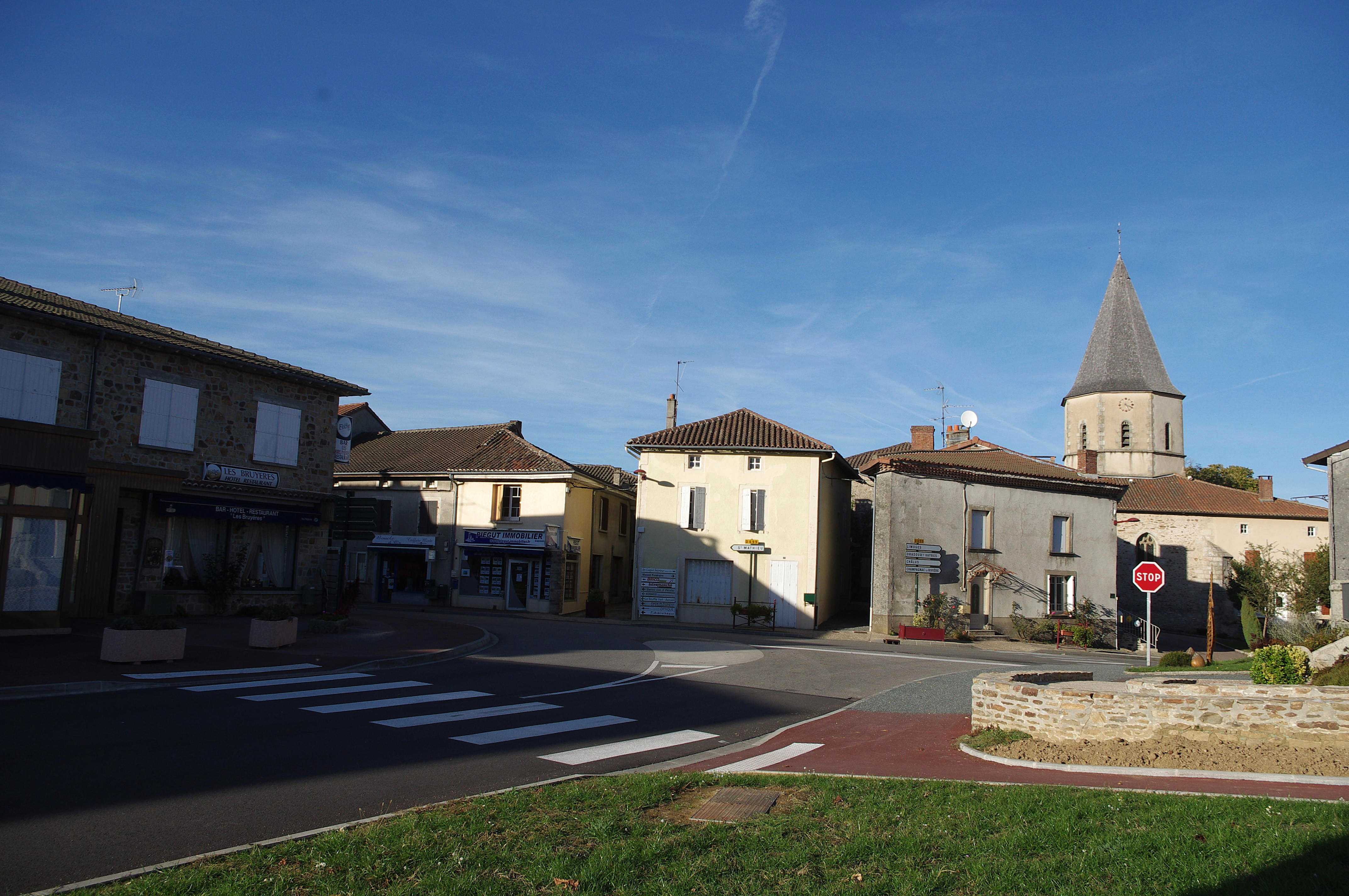 Cussac, Haute-Vienne, France.